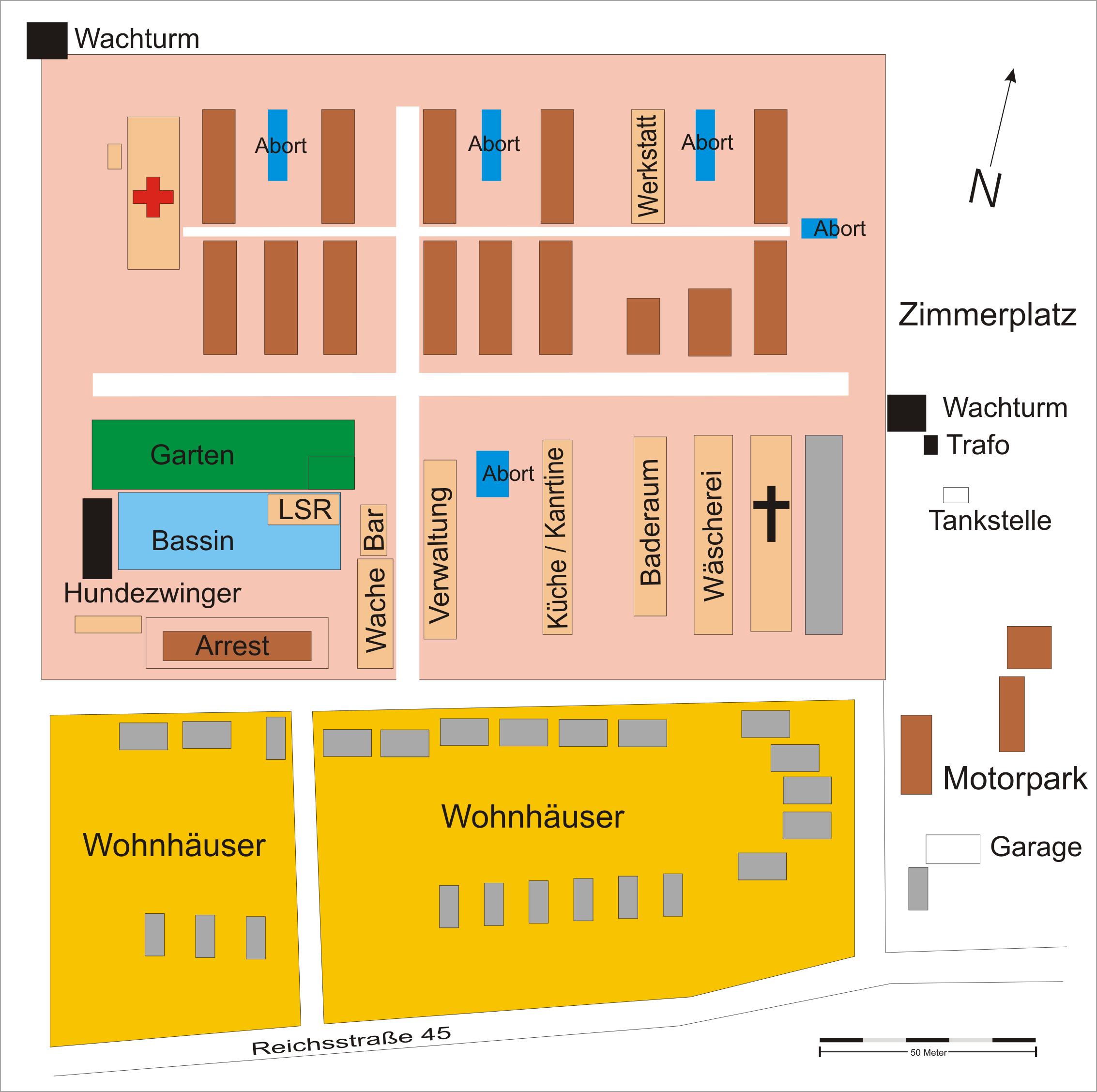 Lageplan des Lagers Rollwald Quelle: selbst erstellt Fotograf/Zeichner: presse03 Datum: 27.04.2006 Sonstiges: nach einer Karte des Wasserzweckverbandes Dieburg